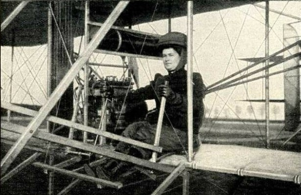 Luftschifferin Käthe Paulus auf ihrer Wright-Flugmachine, 1910